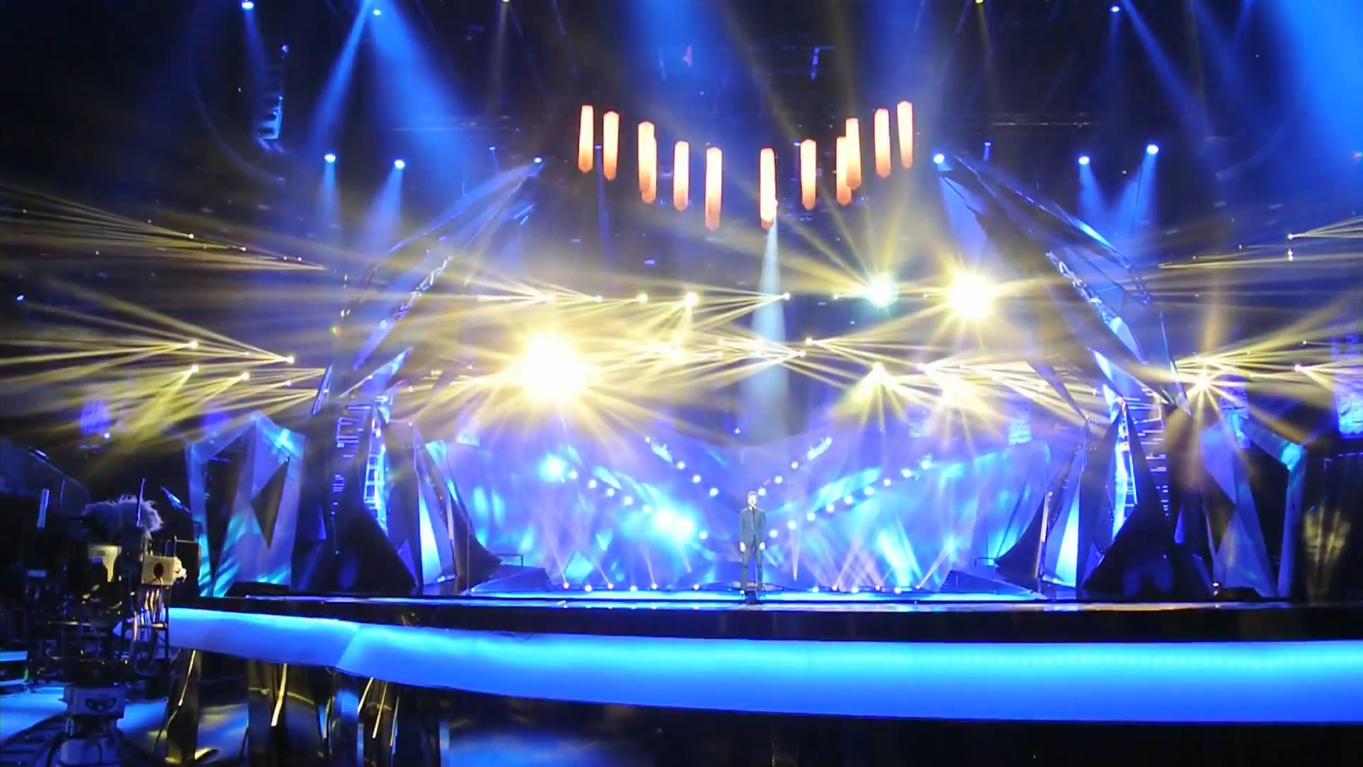 escenariomalmo